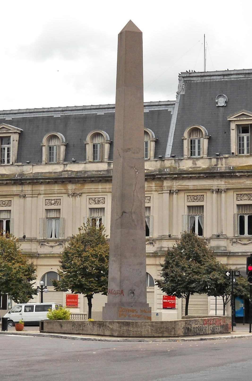 Obelisco de La Plata en 6 y 50, con el Pasaje Dardo Rocha de fondo